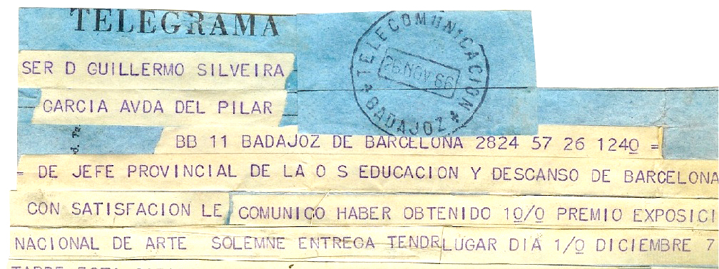 "SER D GUILLERMO SILVEIRA / GARCIA". Telegrama informativo del premio obtenido en la 24.ª edición de la "Exposición Nacional de Arte de la Obra Sindical de Educación y Descanso" celebrada en Barcelona (Salón del Tinell) en noviembre de 1966.